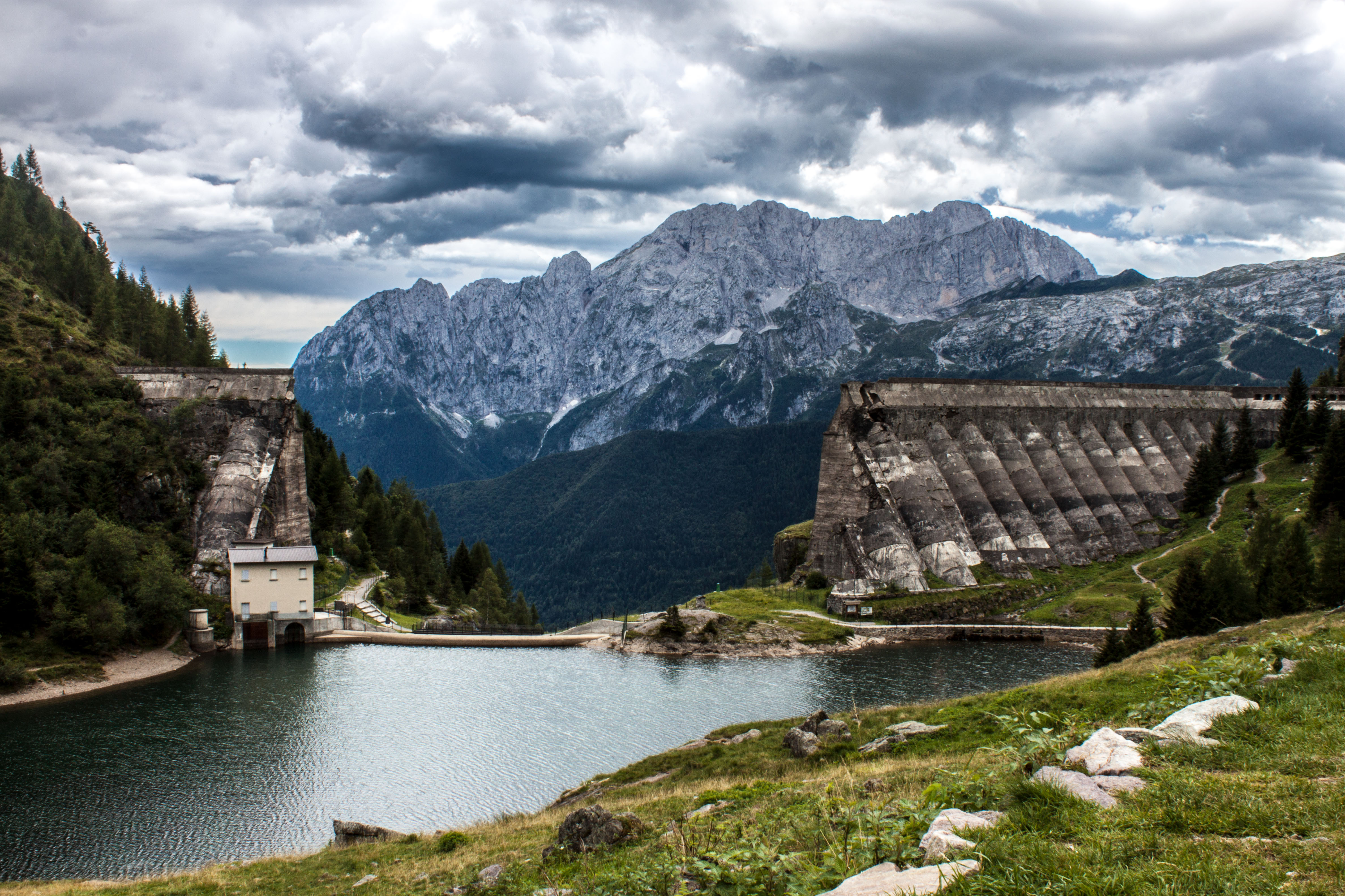 Veduta del lago del Gleno, con la suggestiva testimonianza del disastro causato dal crollo della diga, che la Val di Scalve ancora ricorda. Sullo sfondo il massiccio della Presolana.